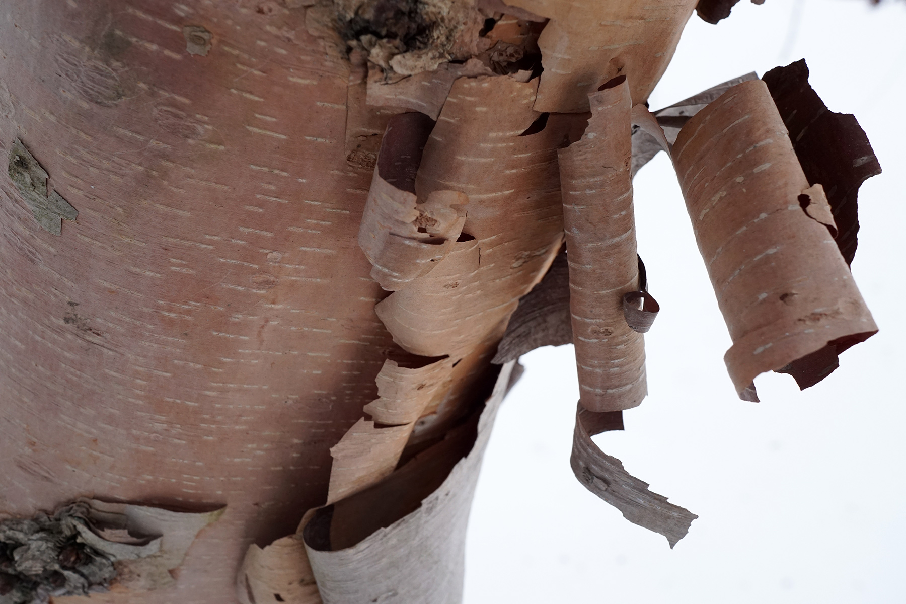 Betula davurica (Black Birch) bark